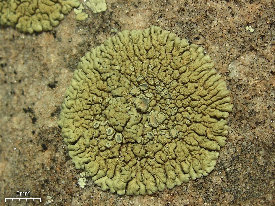 Lecanora garovaglii 20100520.14 Cibola NF, NM